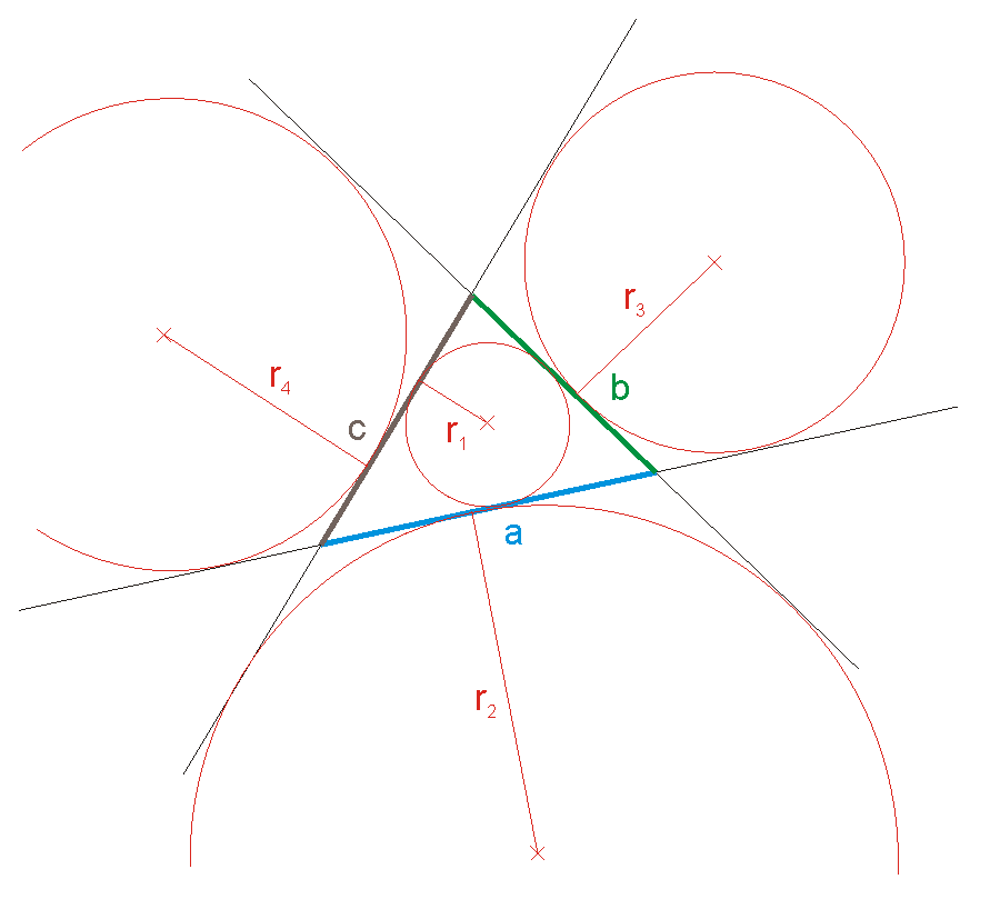 Kreisdefinition durch drei Tangenten